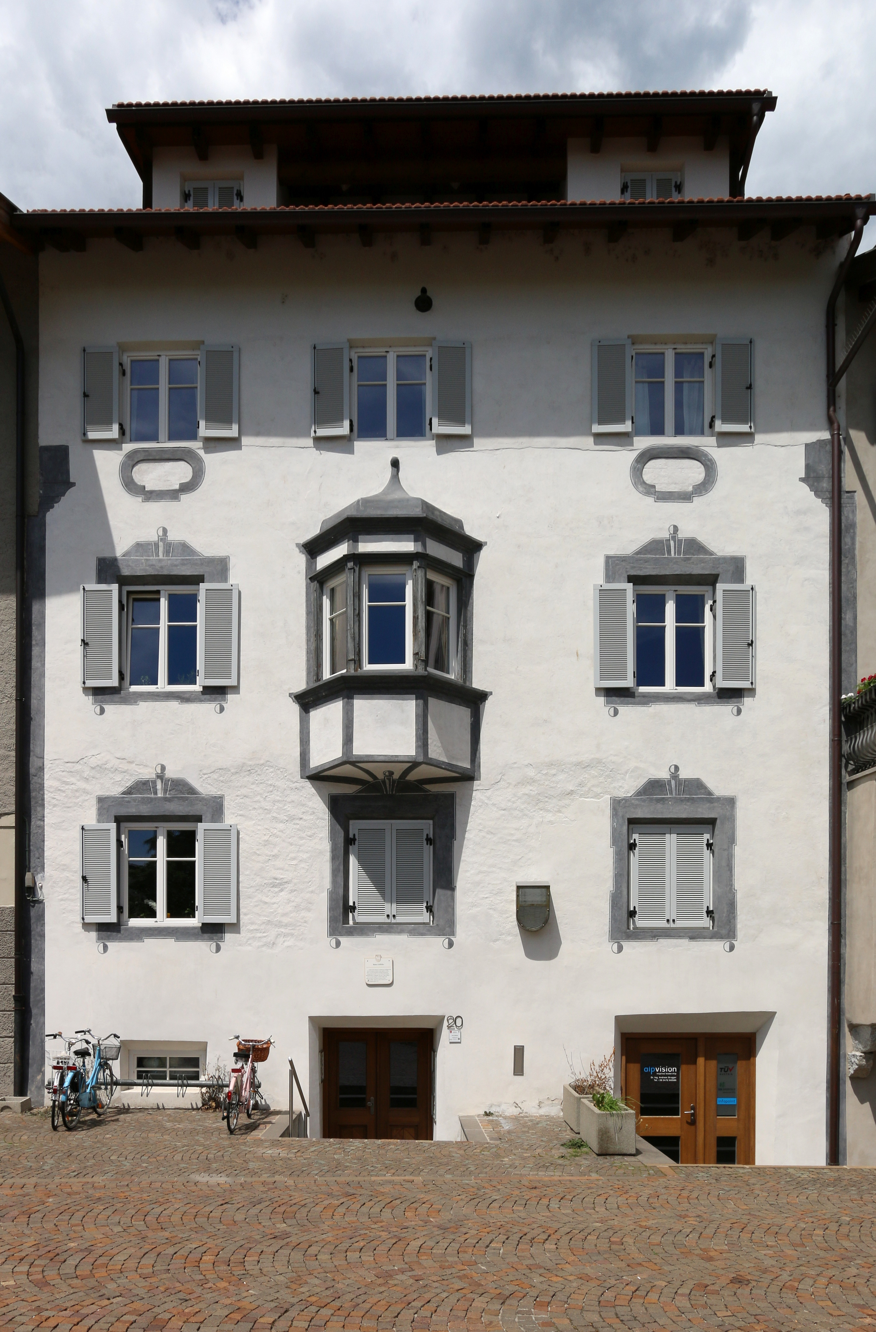 Brixen, Südtirol: Trattengasse 20 Geburtshaus Matteo Goffriller